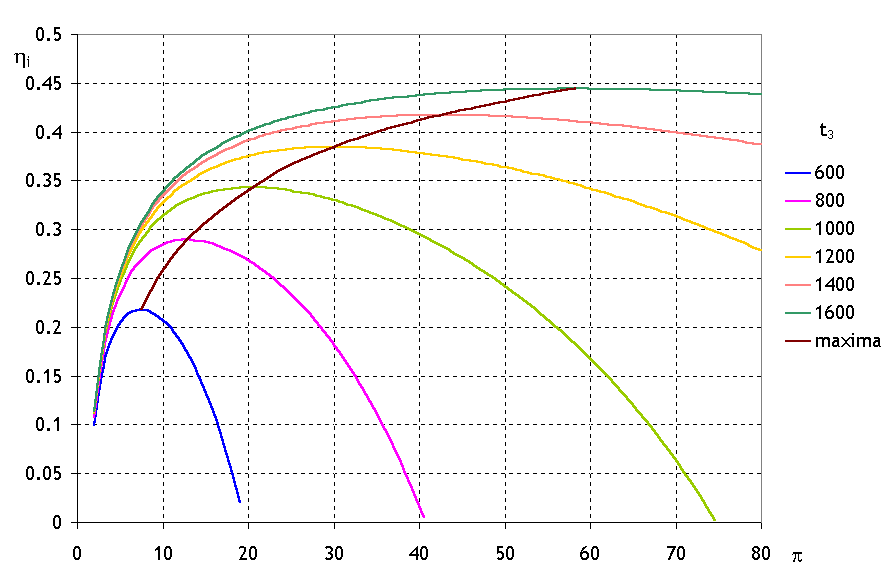 Przykładowa zależność sprawności wewnętrznej turbiny gazowej (sprawności wytwarzania mocy mechanicznej przekazywanej z wieńców wirnikowych na wał) od sprężu dla różnych temperatur gazu na wlocie do turbiny (wylocie z komory spalania) t3. Zwrócona jest tu uwaga na przebieg maksimów poszczegónych krzywych. Dla każdej temperatury t3 występuje pewne maksimum sprawności, a jego położenie odpowiada większym sprężom dla rosnących temperatur t3.